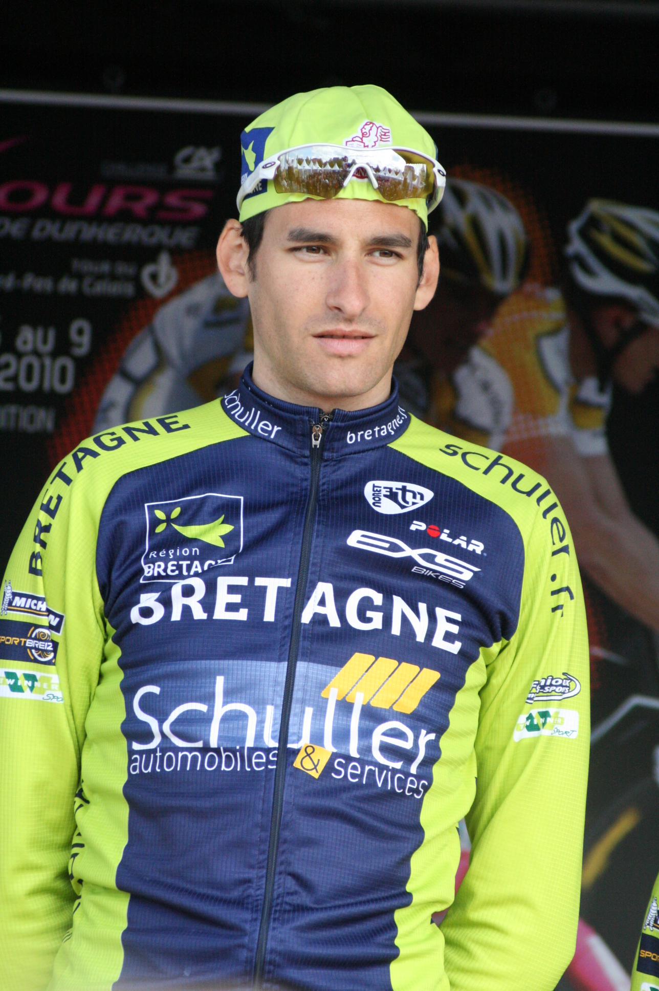 Florian Guillou lors de la présentation des équipes des 4 jours de Dunkerque 2010